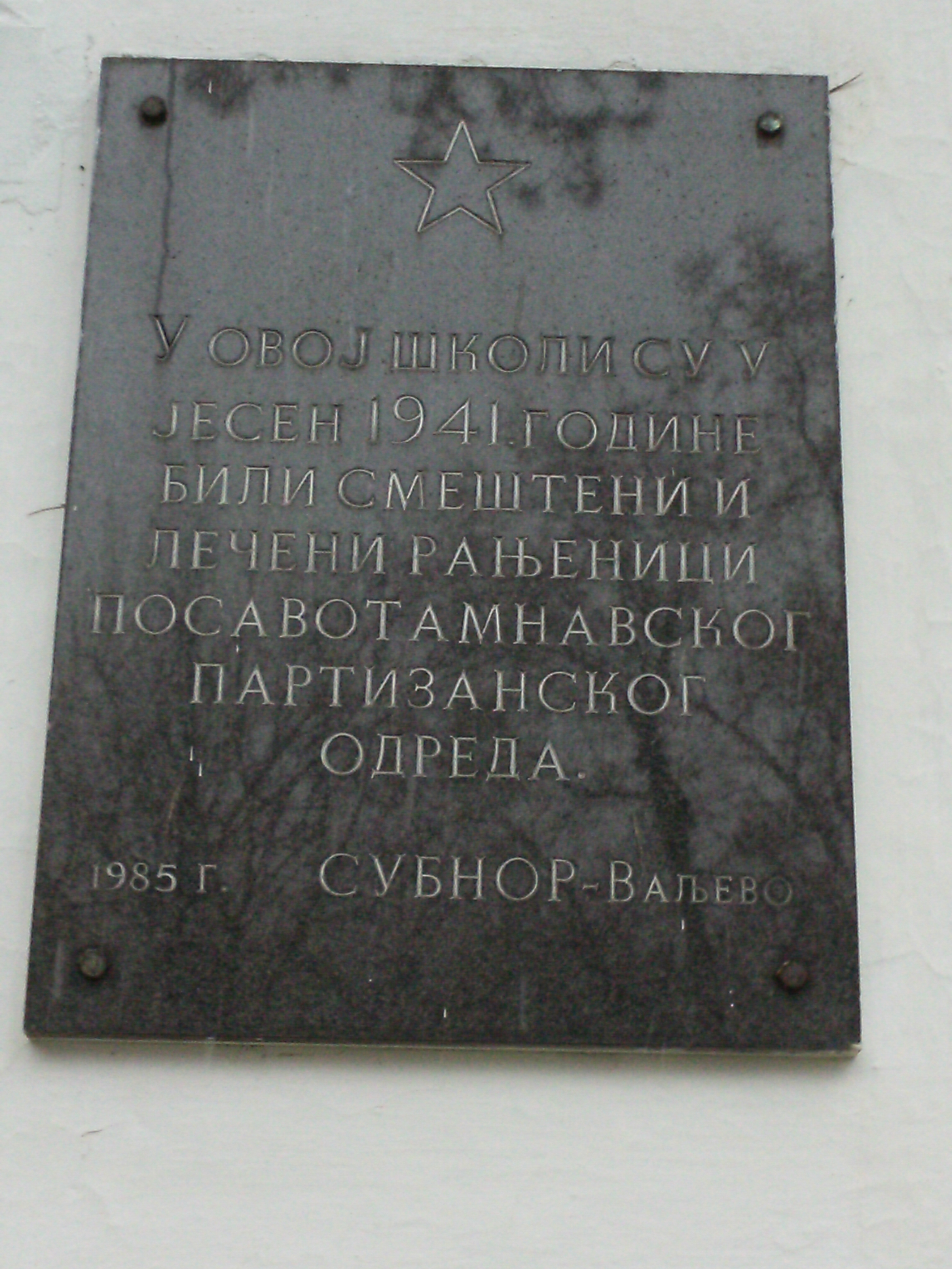 O postanku sela